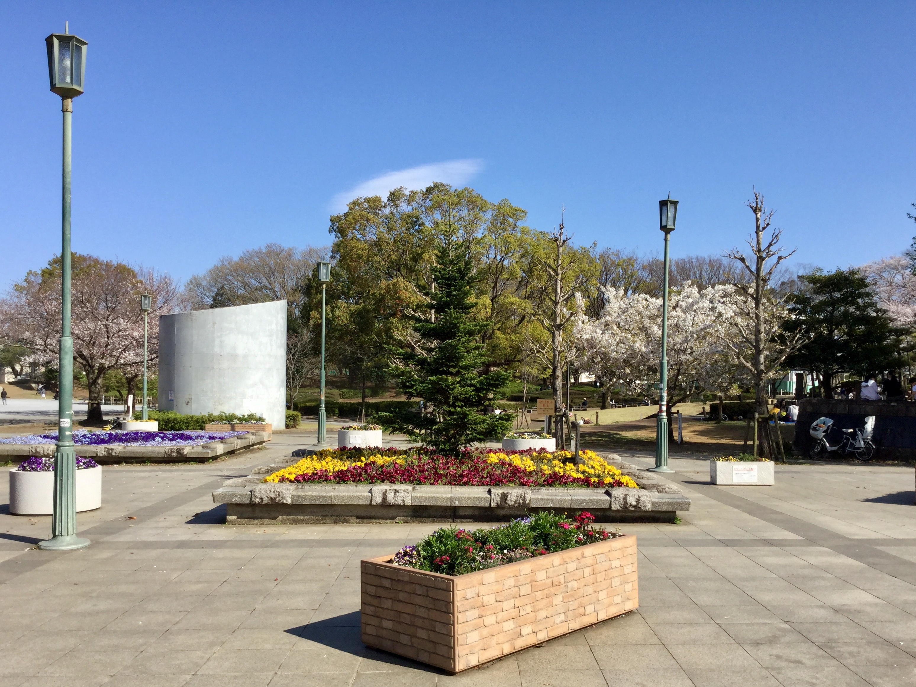 神奈川県藤沢市にある湘南台公園